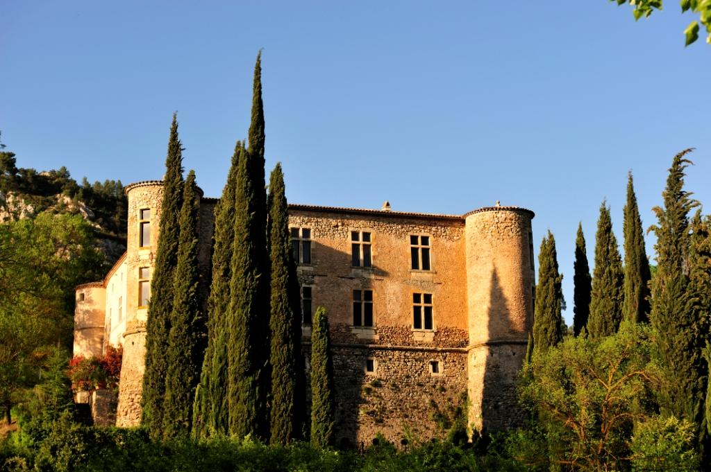 Château de Vins-sur-Caramy côté Sud